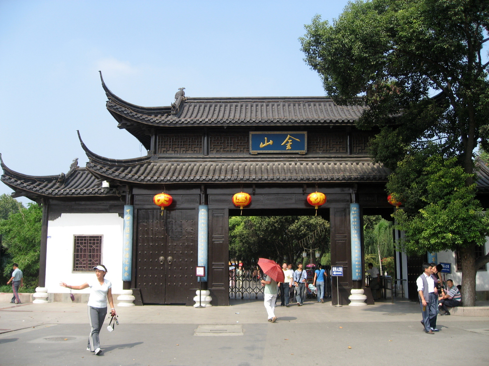 金山寺